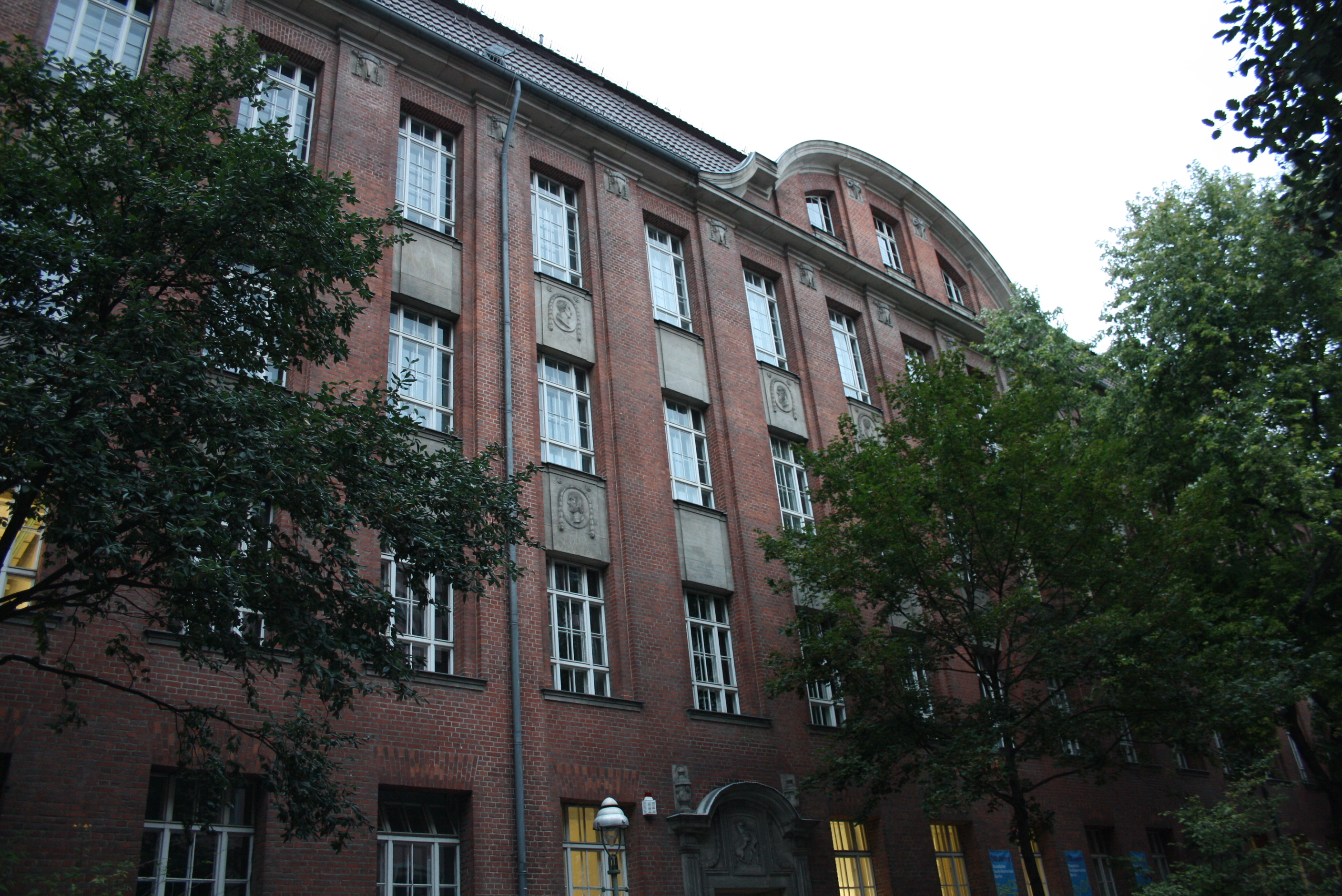 Friedrich-Werdersches Gymnasium Bochumer Straße 8-8C